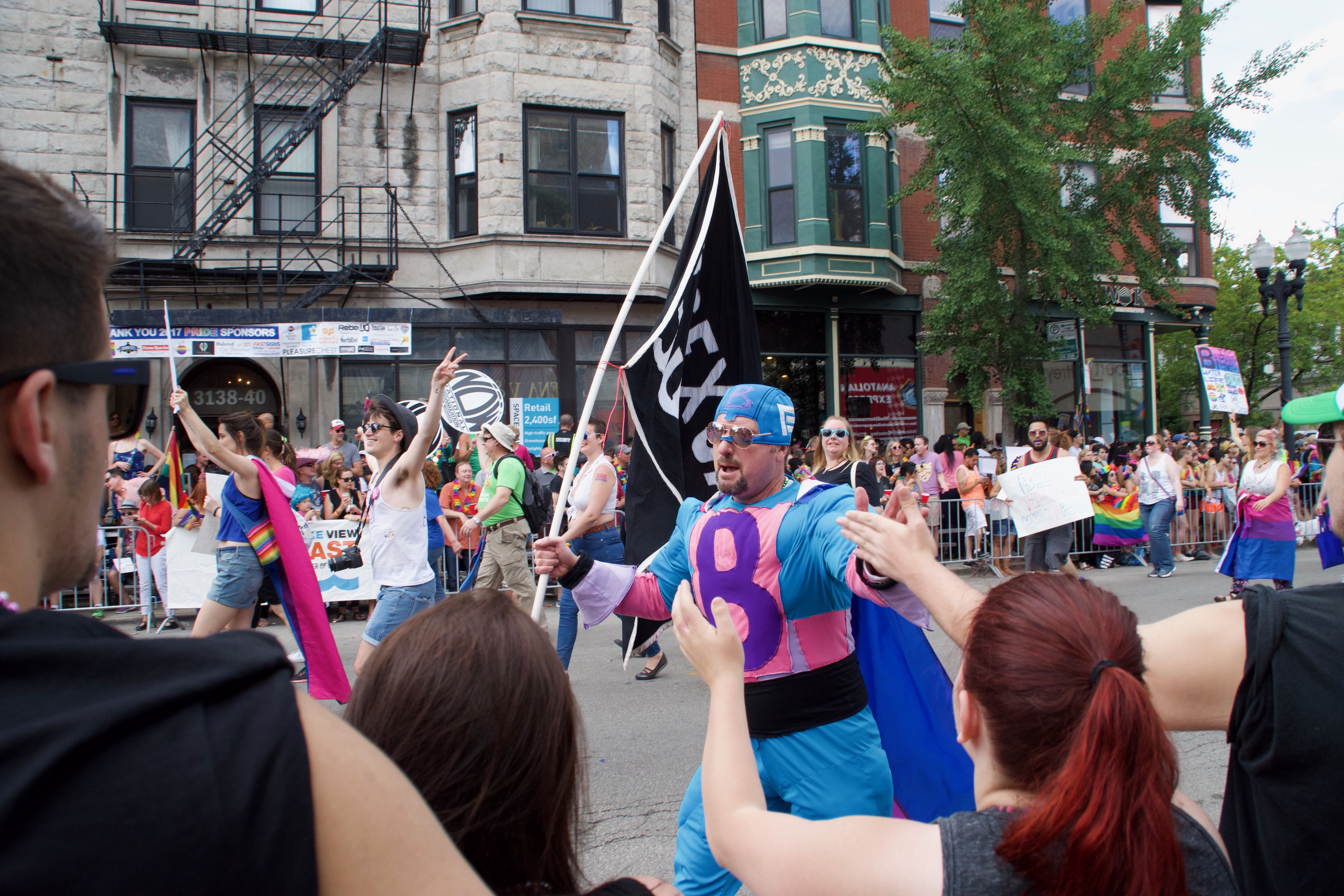 Bisexual Man